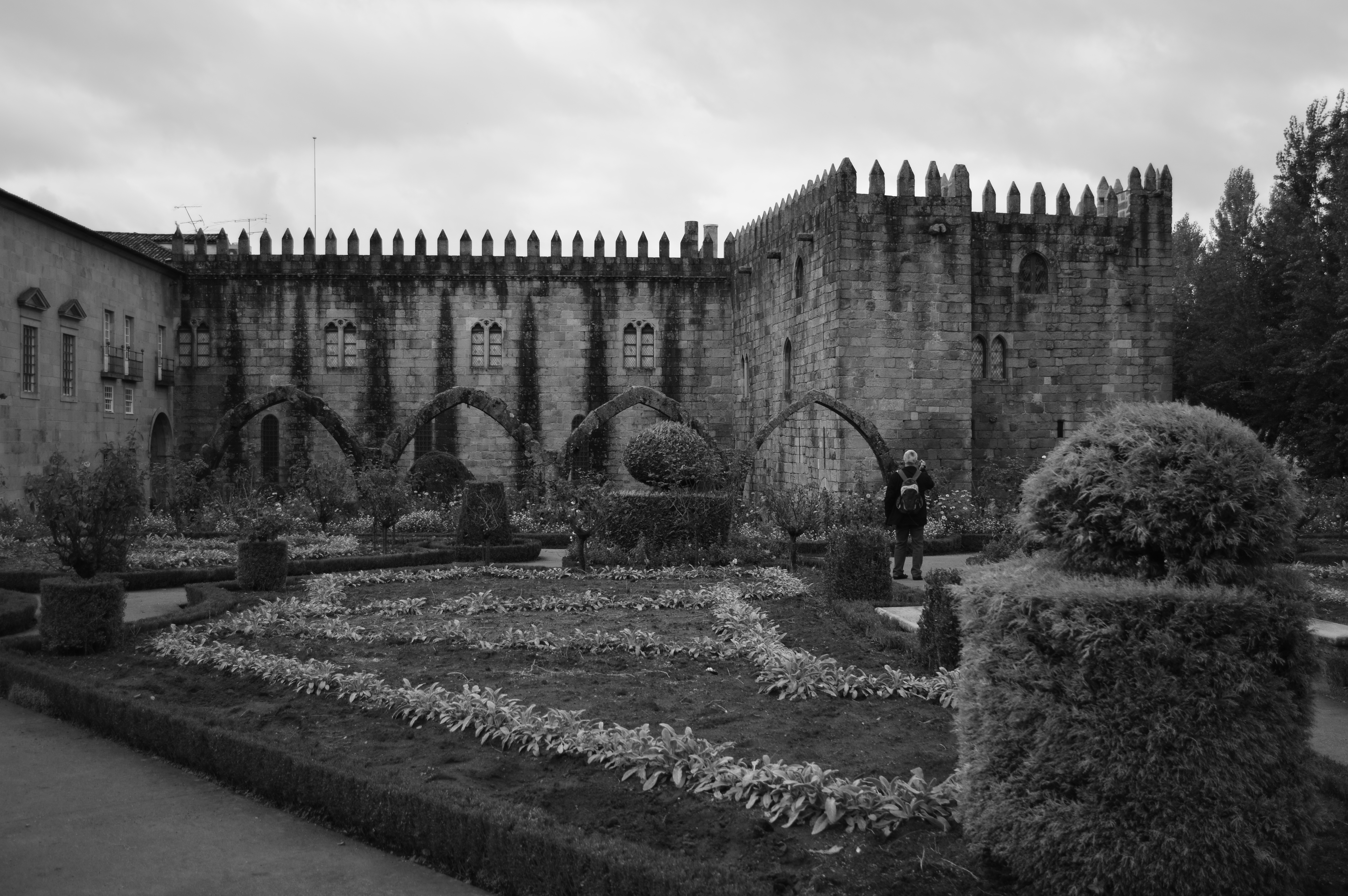 Jardim de Sta. Bárbara